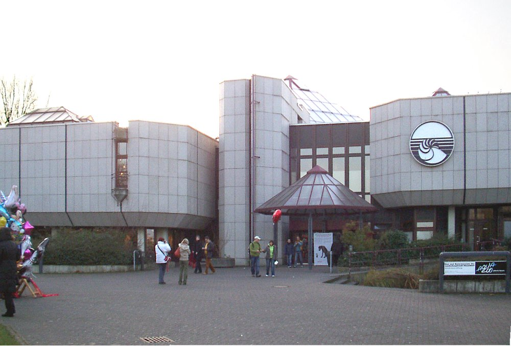 Aquazoo-Löbbecke-Museum